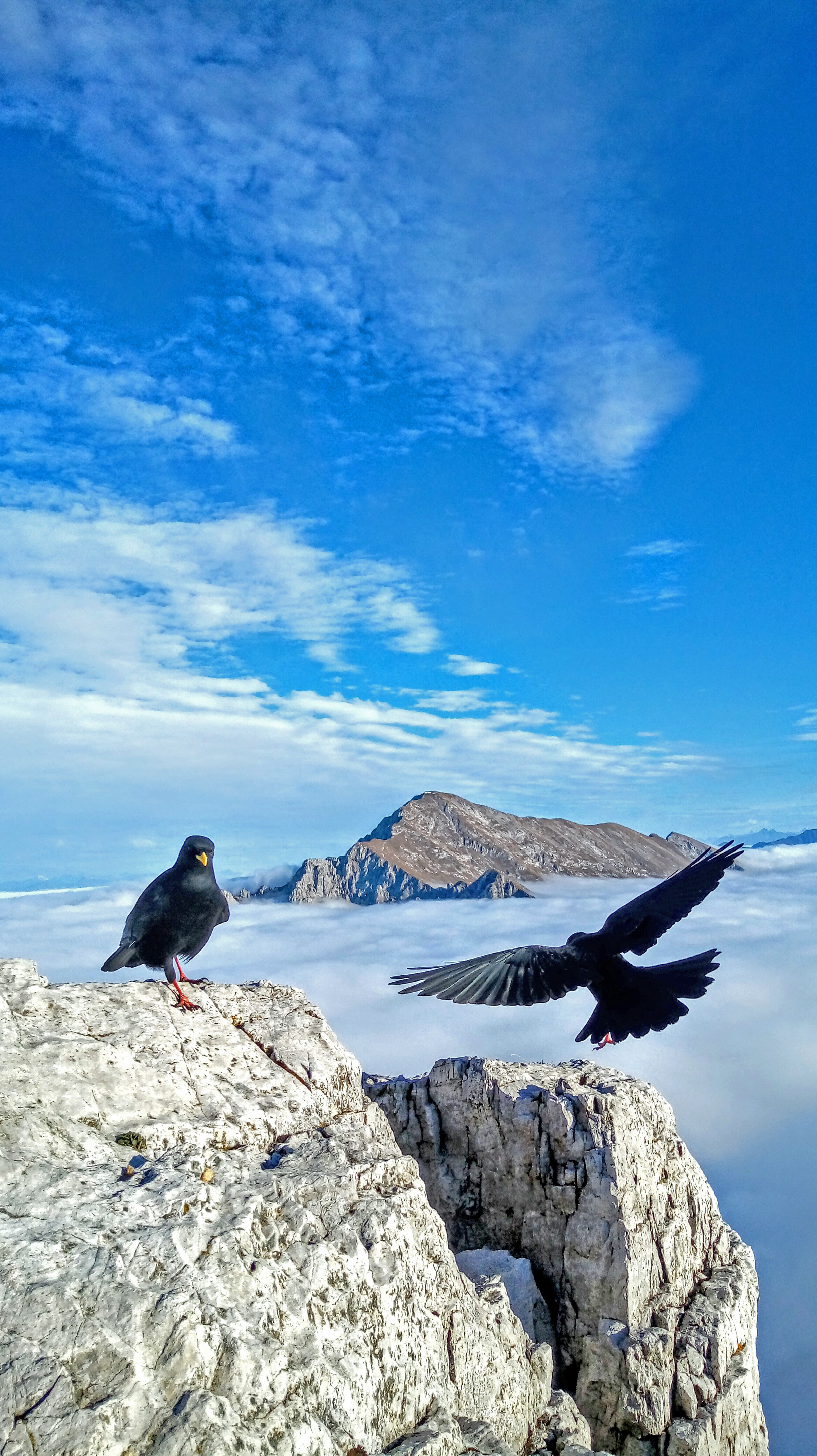 Grigne (Q47478903)